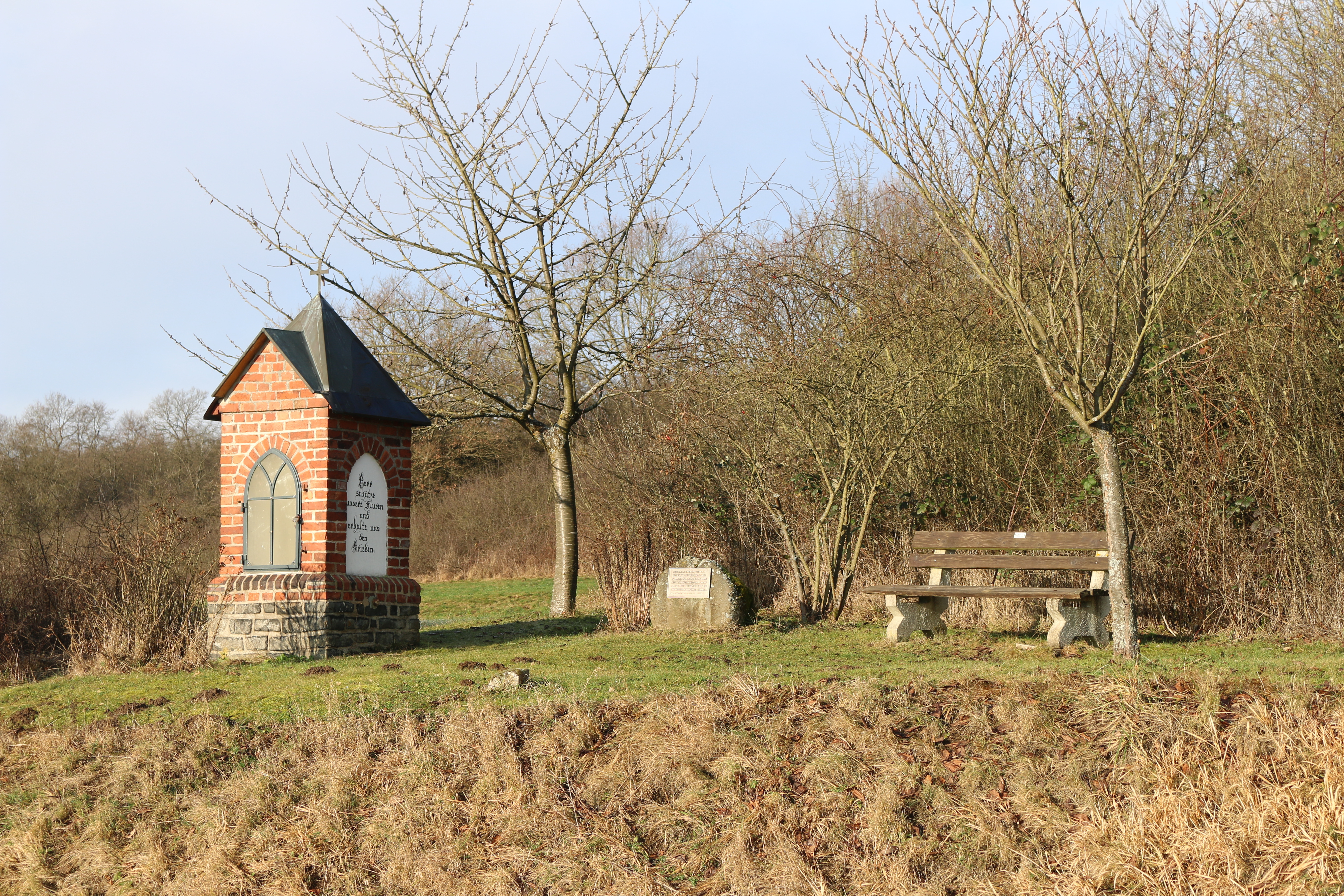 Bildstock an der Schieferstraße zuwischen Hintermeili8ngen und Lahr, errichtet 1919